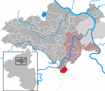 Macken in Rhineland-Palatinate - district Mayen-Koblenz